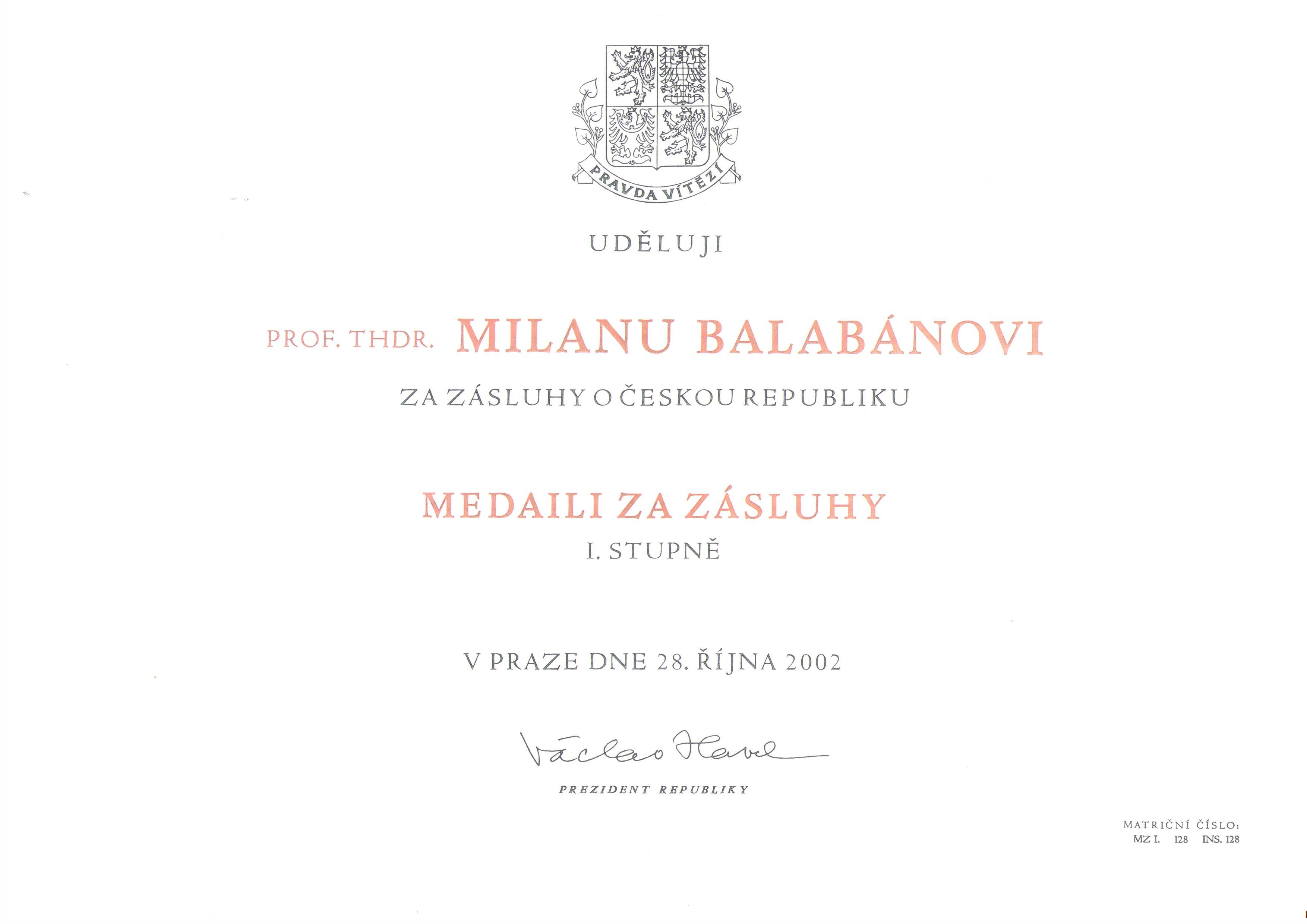 Certifikát o udělení medaile Za zásluhy profesoru Milanu Balabánovi.